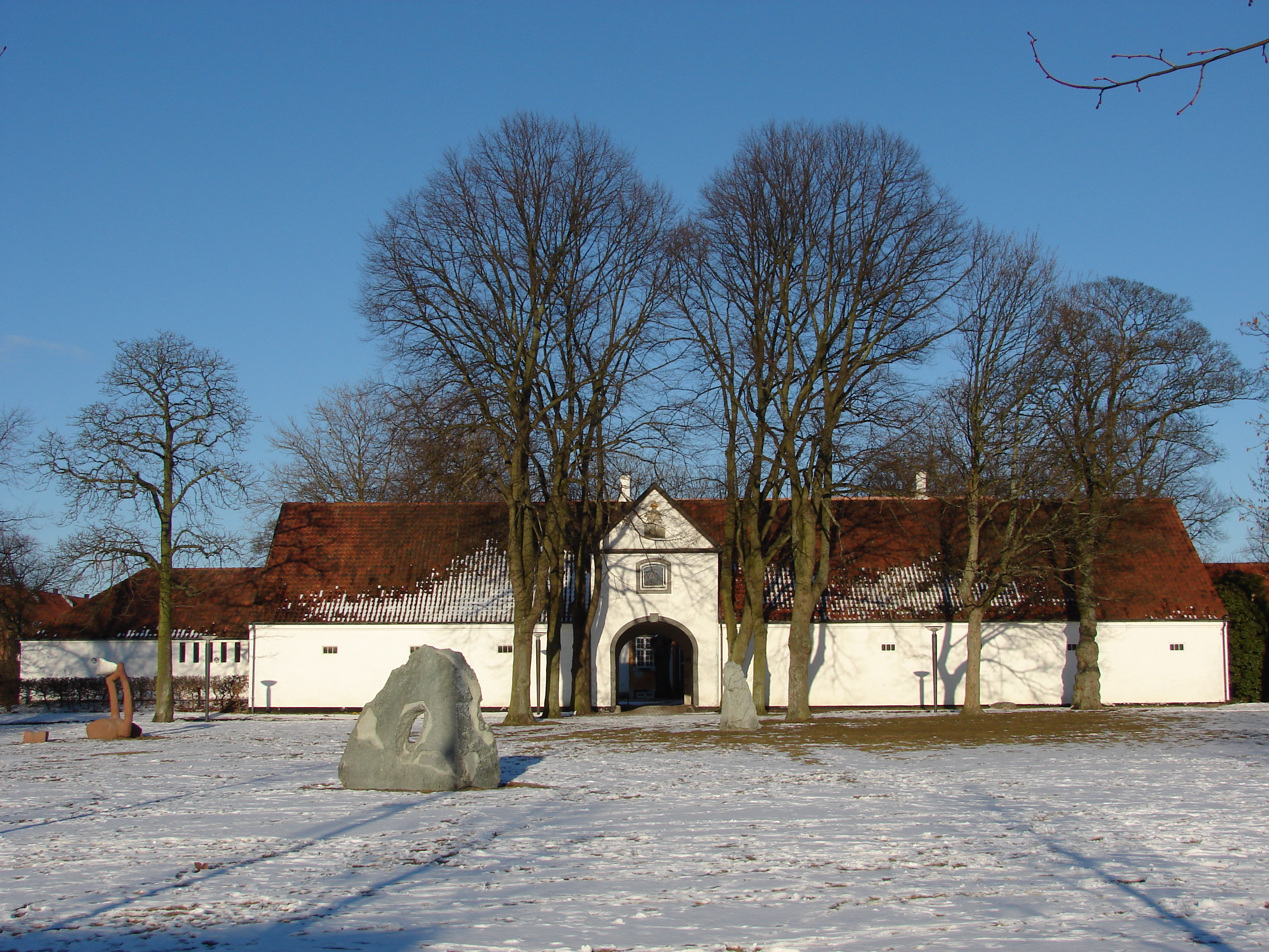 Kastrupgård på Amager ved København